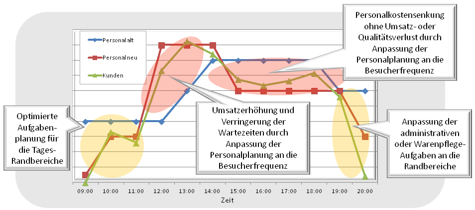 Personaleinsatz Optimierung als CEM Maßnahme nach People Counting